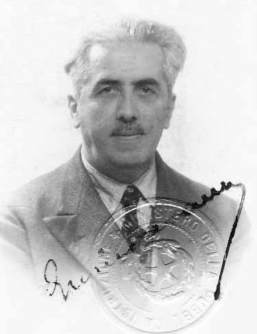 Enrico Avanzi (Soiano del Lago, 19 gennaio 1888 – Pisa, 17 marzo 1974) è stato un genetista e agronomo italiano.